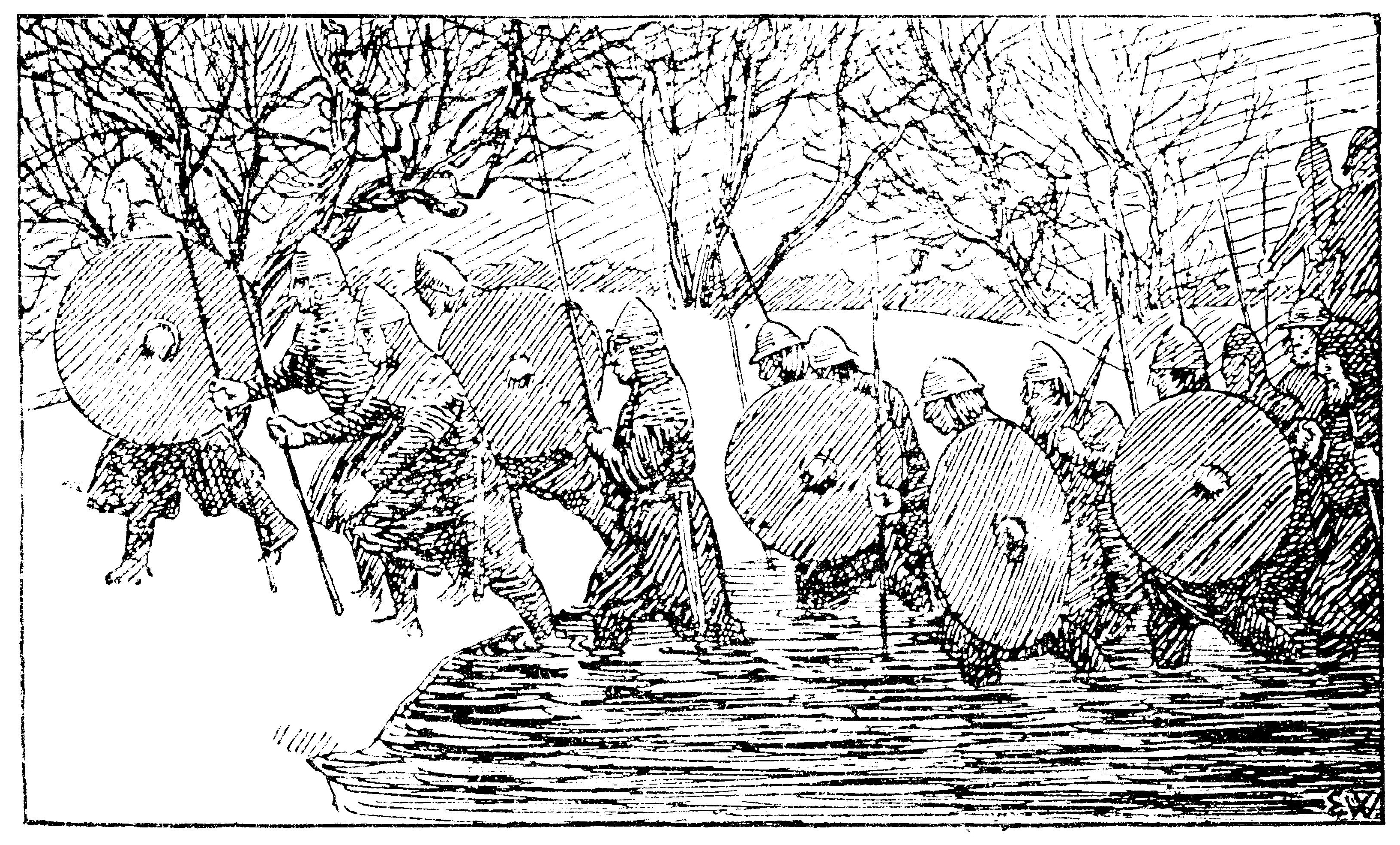 Erik Werenskiold: Illustration for Magnus Erlingssons saga, Heimskringla 1899-edition. nn: «Erling og mennene hans går over åa.»